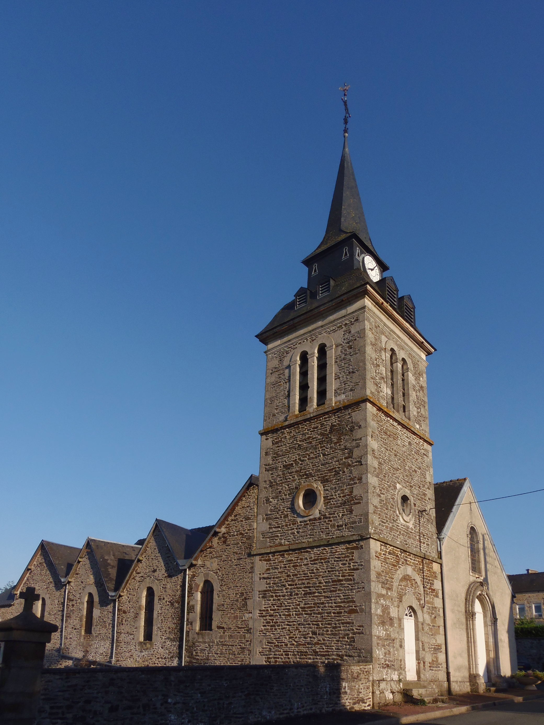 Couptrain (Pays de la Loire, France). L'église Notre-Dame-de-l'Assomption.